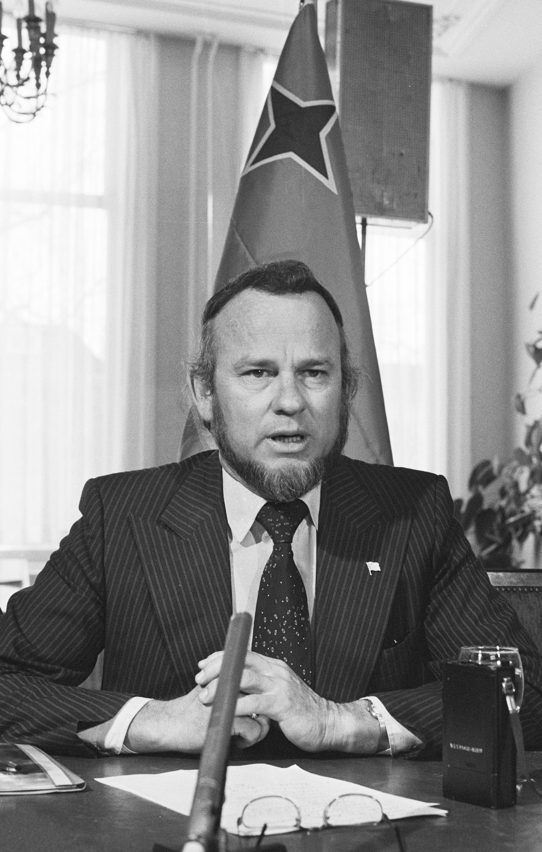 Opening "Aruba Huis" in Den Haag . Betico Croes tijdens persconferentie, 20a mr. J. H. van der Kuyp , vert. Aruba en Betico Croes